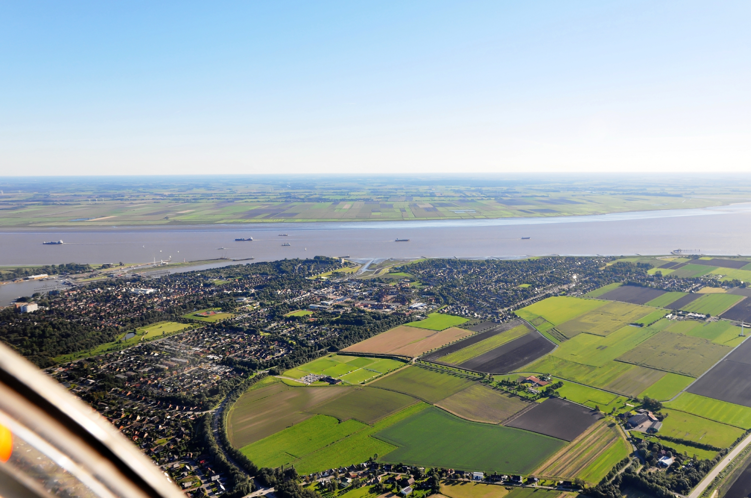 Luftaufnahmen Nordseekueste 2013-09